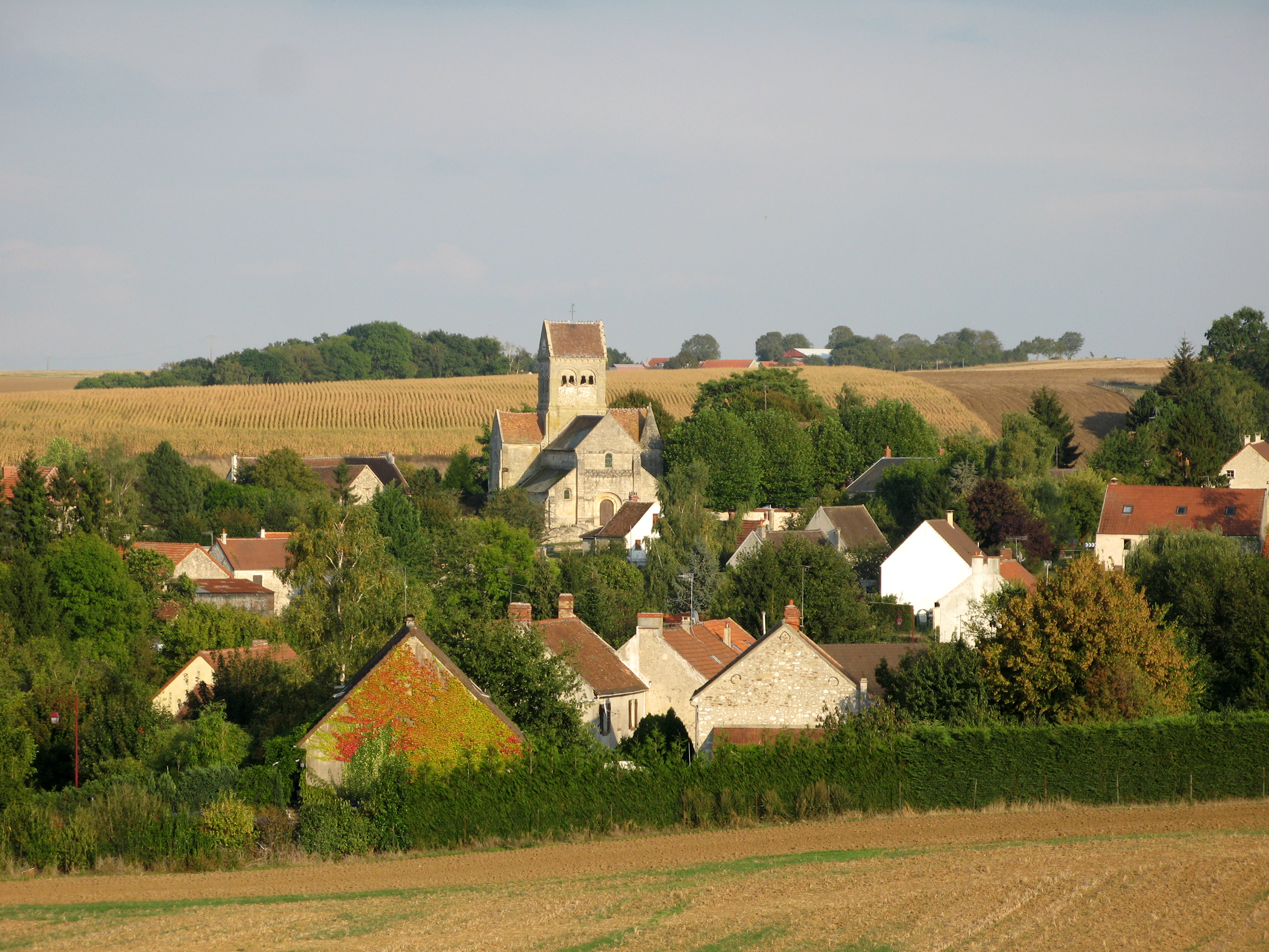 Latilly (Aisne, France) - Panorama sur la localité. . .